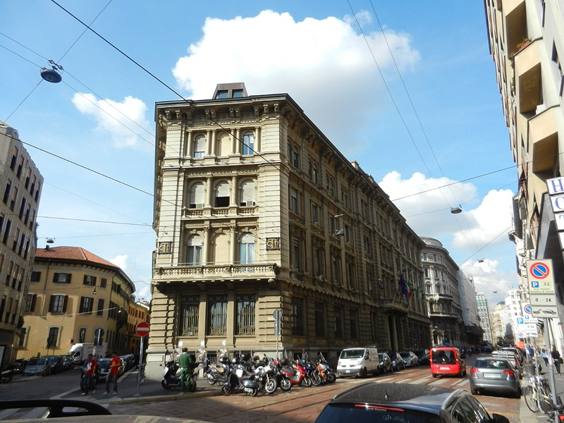 Milano - Palazzo Bertarelli